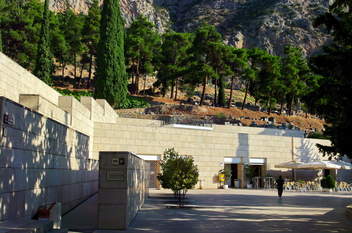 Delphi, Eingang Museum